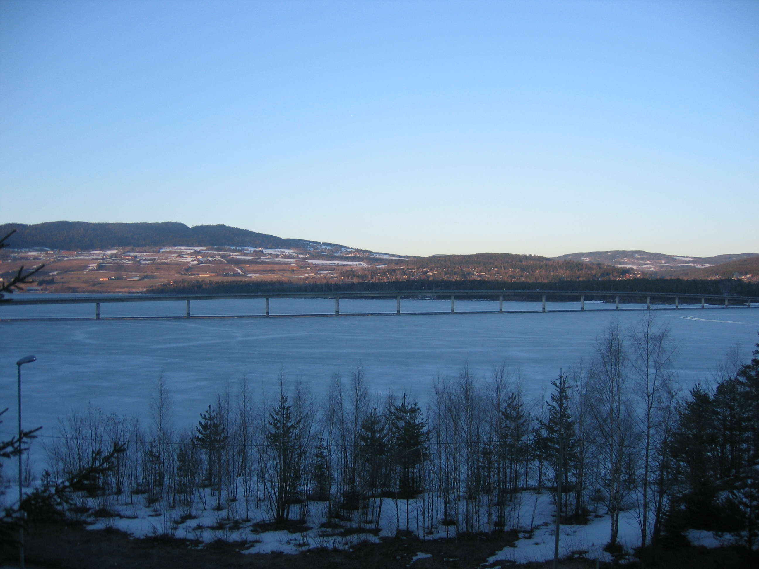 Mjøsa Bridge, Hedmark, Norway.